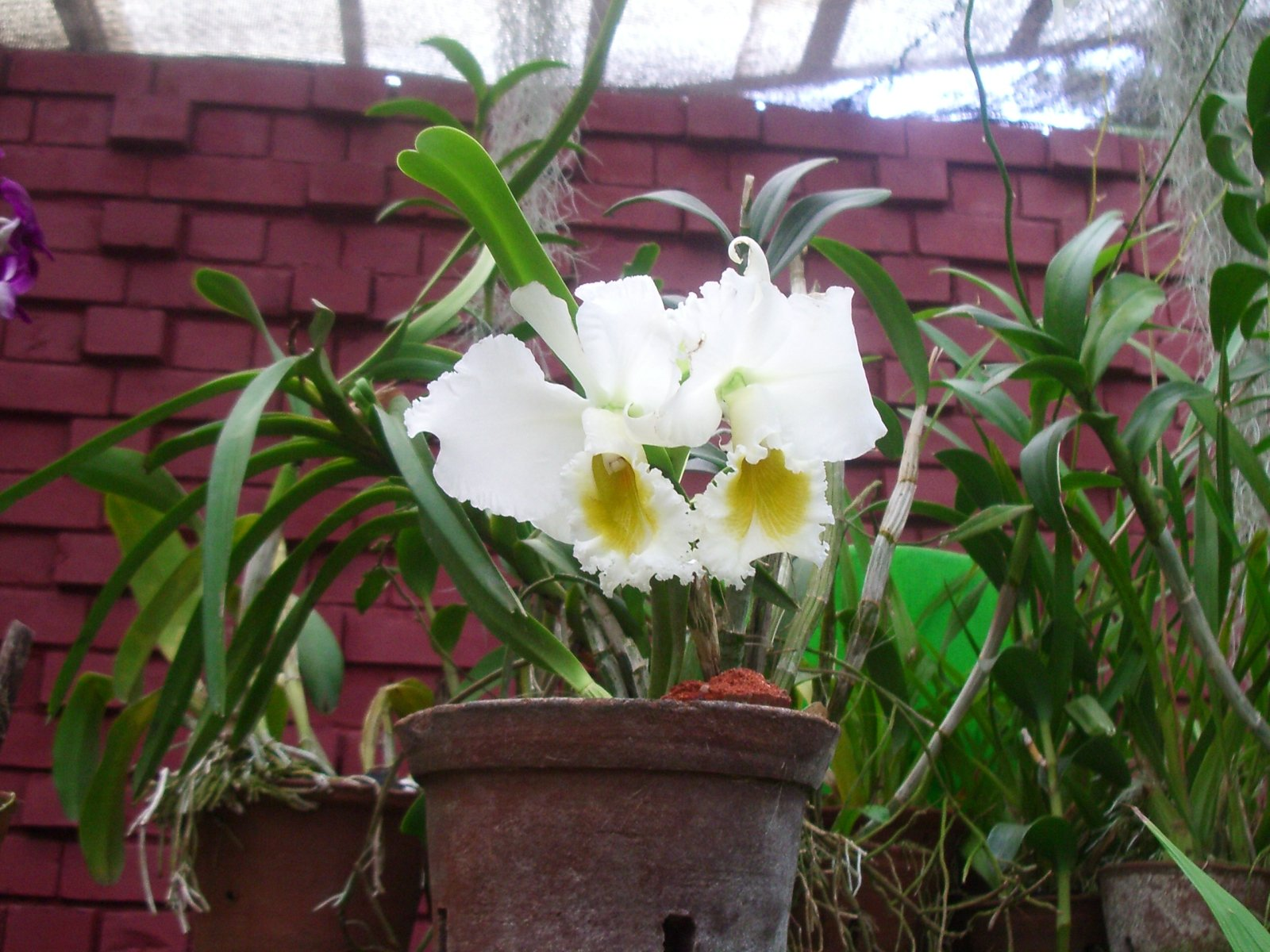 Orquidea de l'important col·lecció del jardi botanic de Peradeniya, prop de Kandy, província Central, Sri Lanka; foto feta per J. Ollé el juliol del 2006